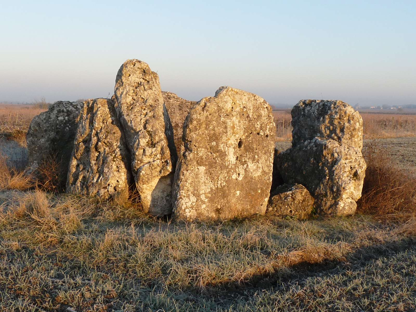 dolmen de St-Même-les-Carrières, Charente, France